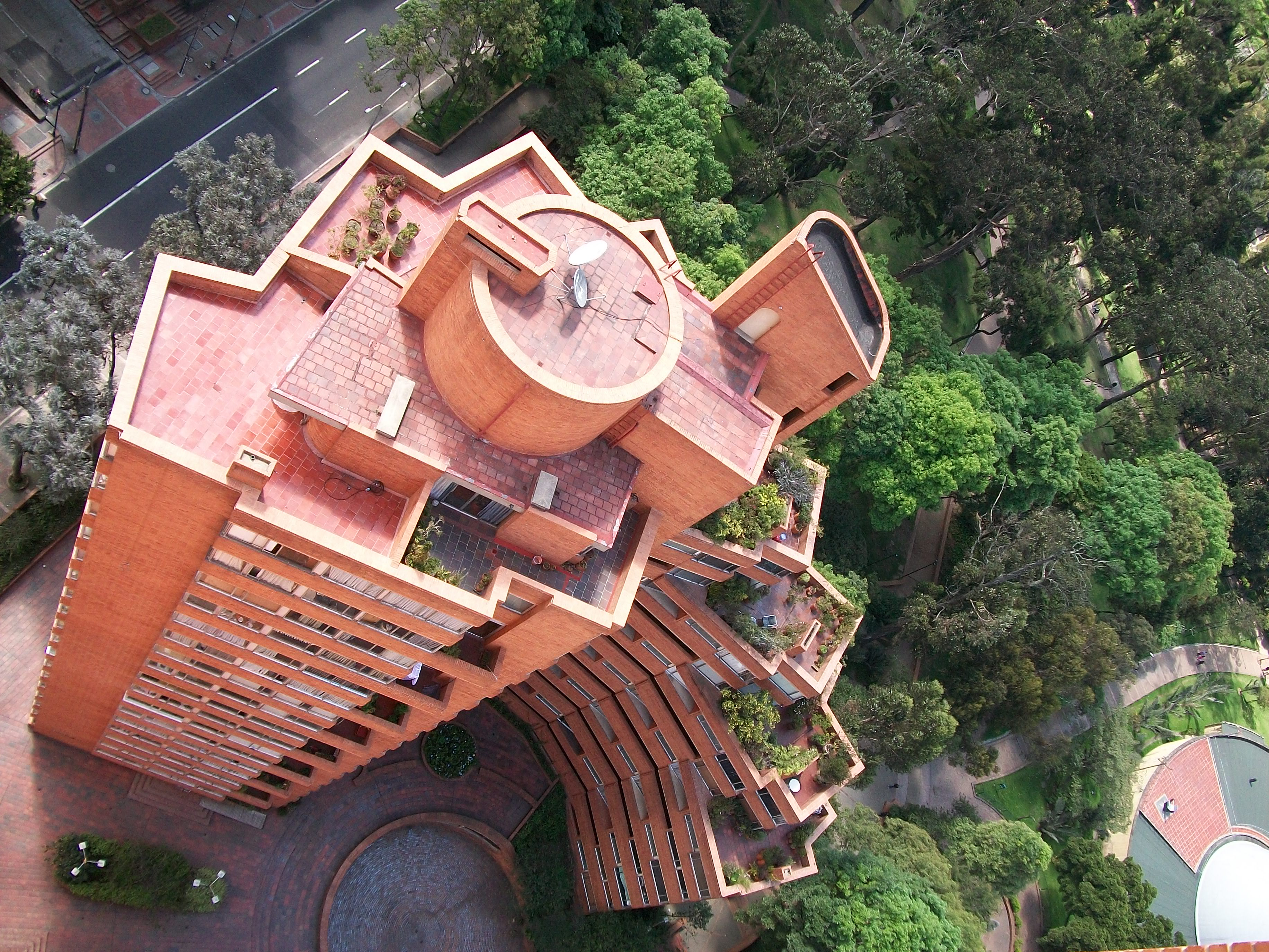 Torres del parque. Torre B desde el piso 32 de la Torre A.